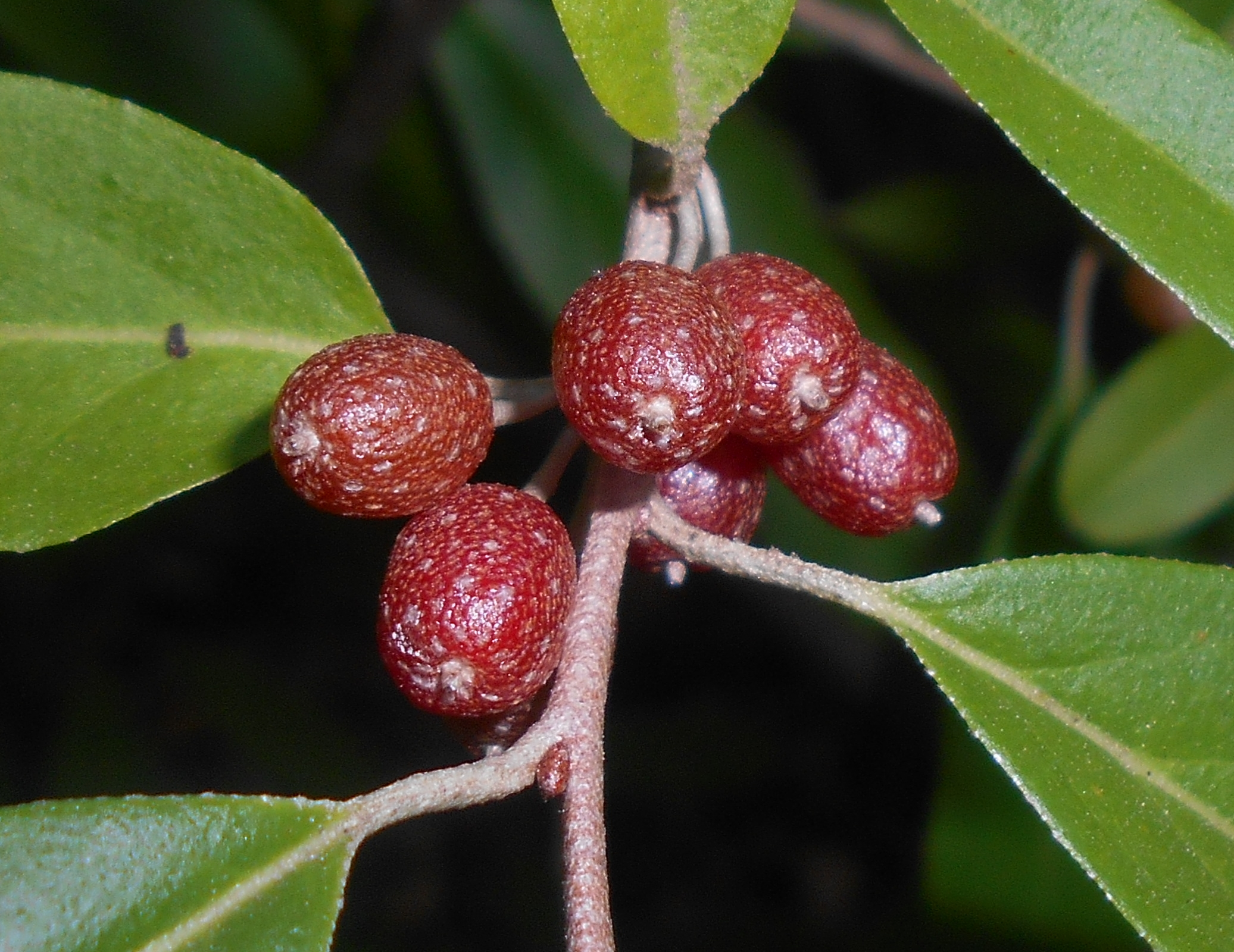 Oliwnik wielokwiatowy (Elaeagnus multiflora), Ogród Botaniczny UMCS w Lublinie.